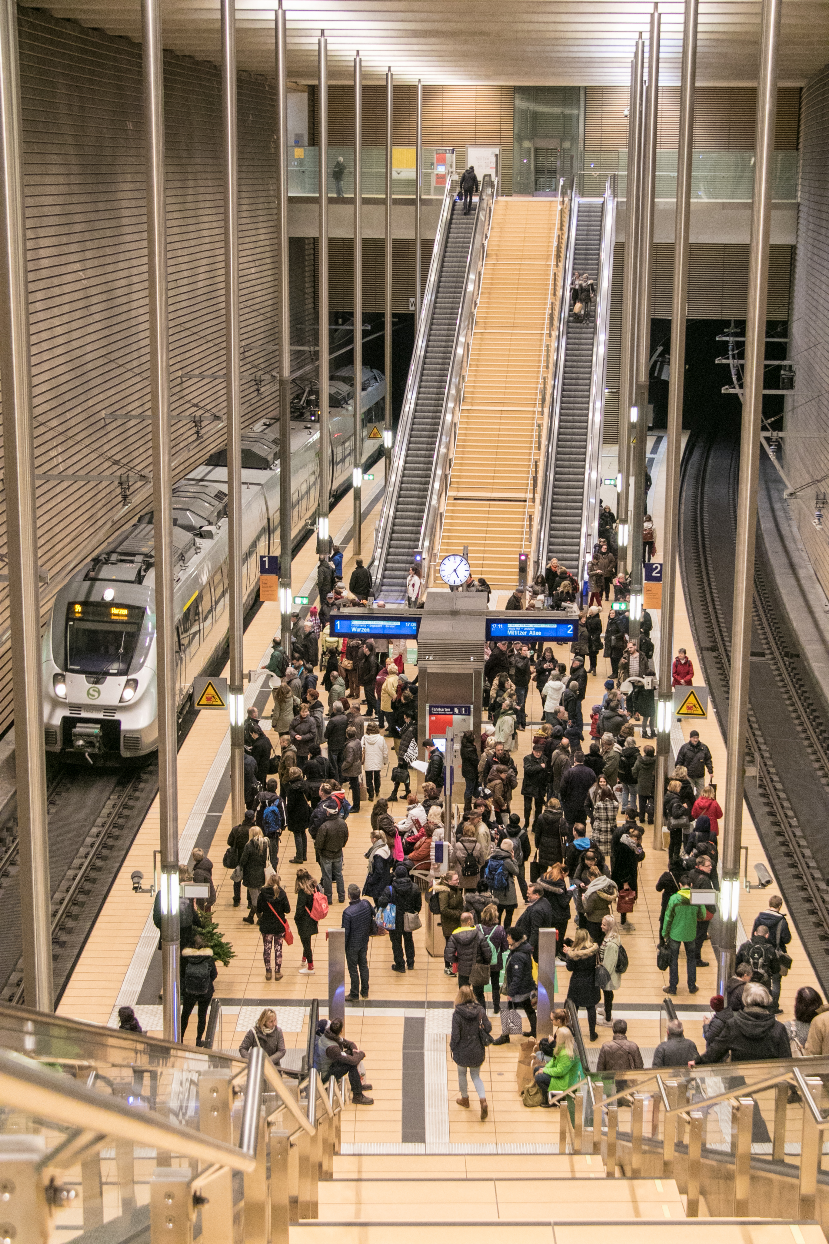 Nutzung der Station Markt am Nachmittag